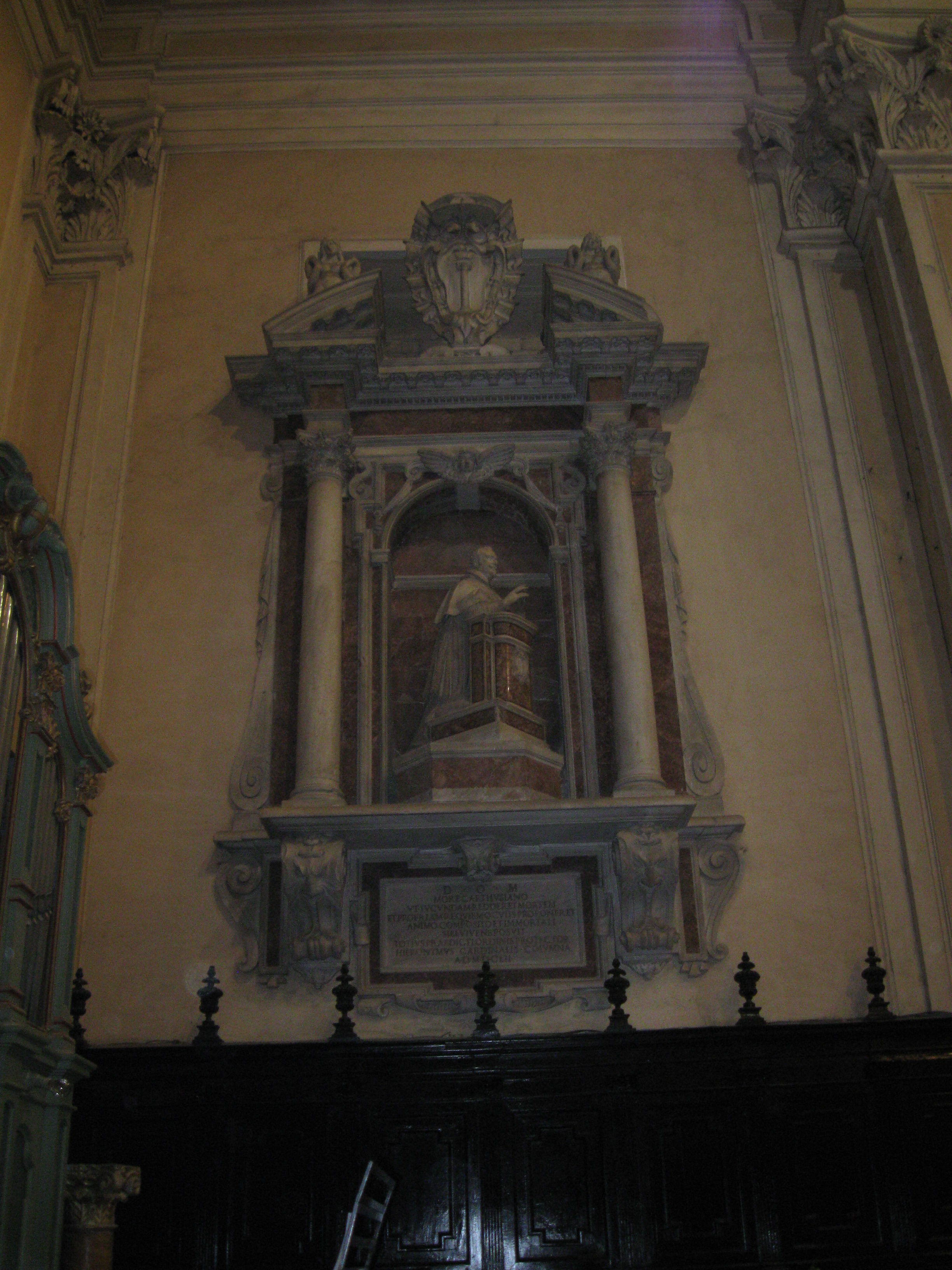 La statua del cardinal Colonna nella Basilica di San Barnaba a Marino (RM)